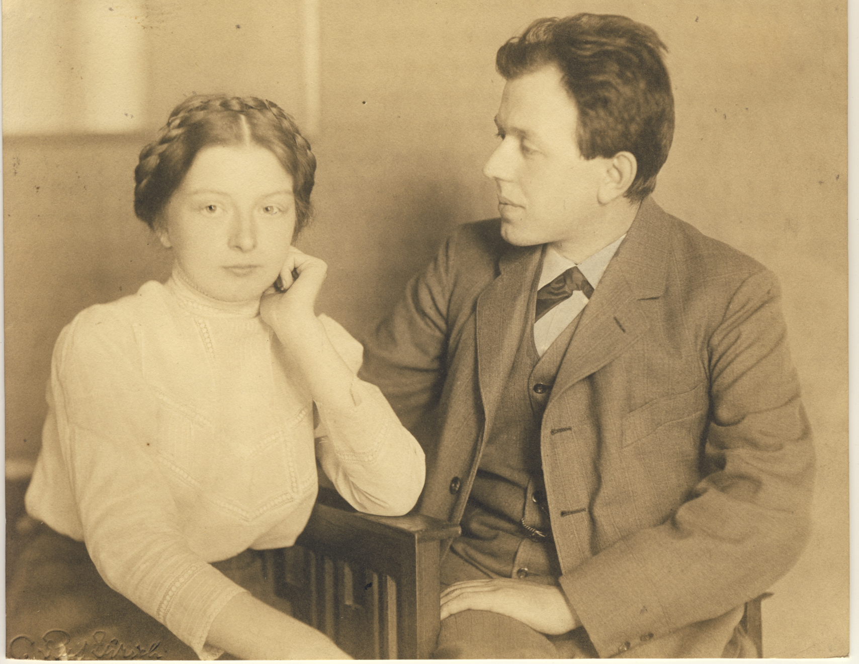 Фридрих Платтен со второй женой - Ольгой Николаевной Корзлинской